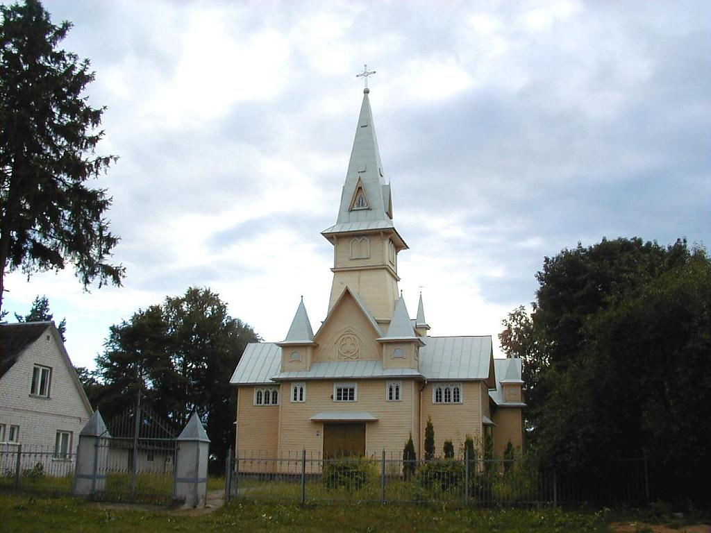 Silenes baznīca 2001-08-11